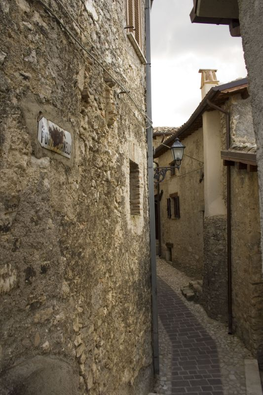 Una via del borgo di Morro Reatino (provincia di Rieti, Lazio)